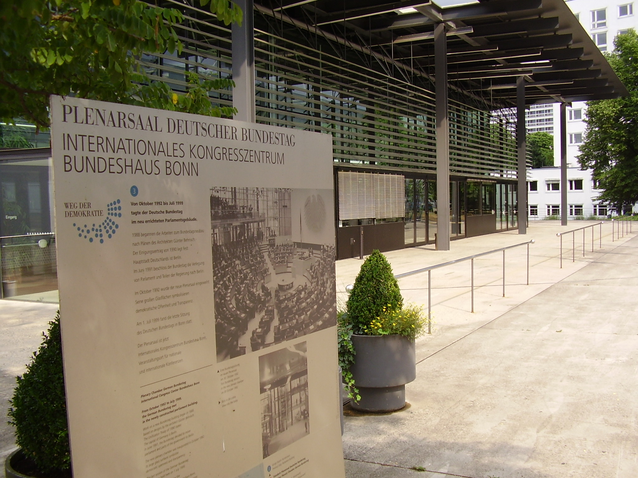 Station des "Weg der Demokratie" am ehemaligen Plenarssal (jetzt: Internationales Kongresszentrum Bundeshaus Bonn) in der Bundesstadt Bonn